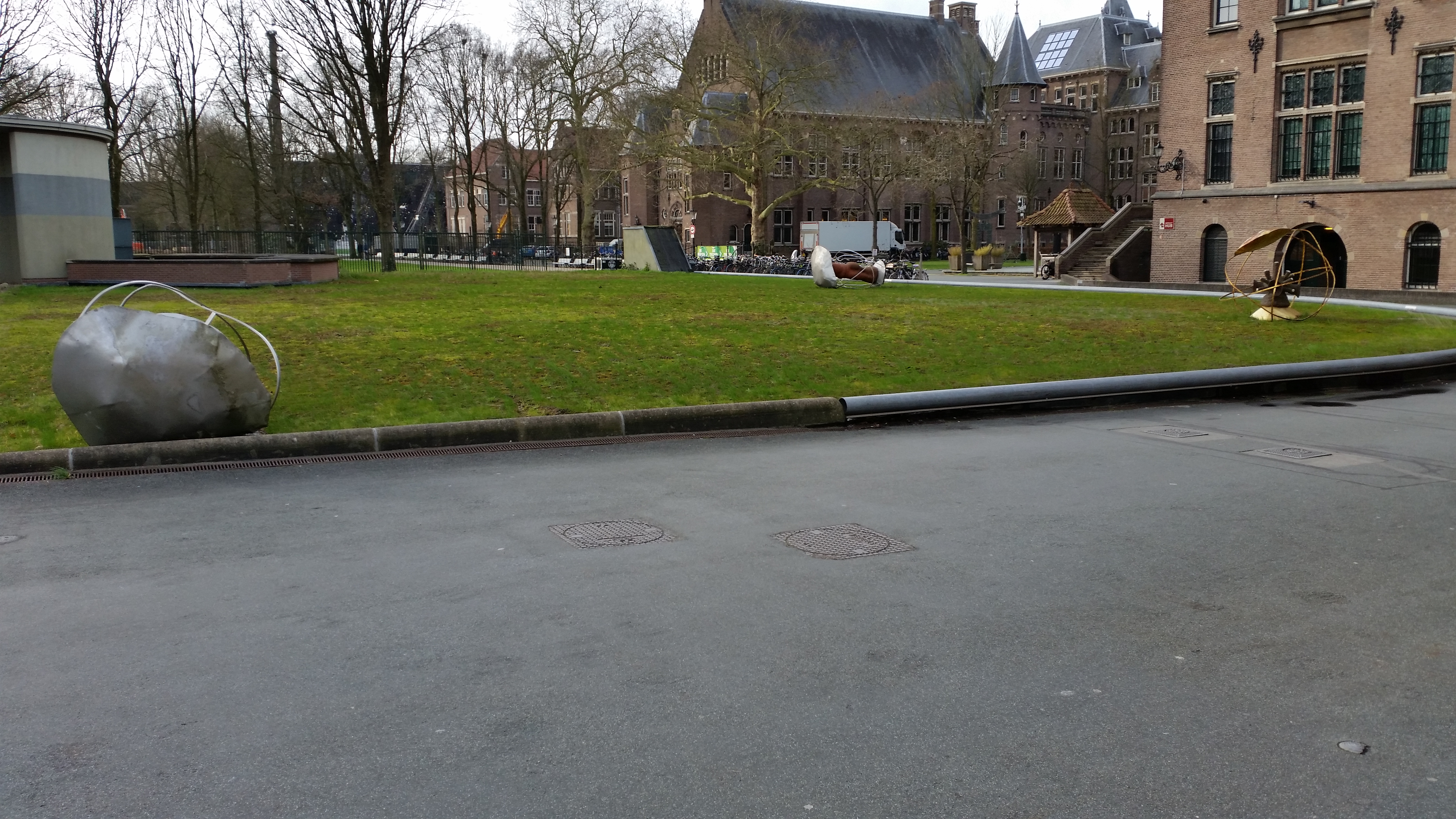 Impressie van Geloof, hoop en liefde, omver gewaaid tijdens een februaristorm 2020 in een tuin achter het Tropenmuseum.